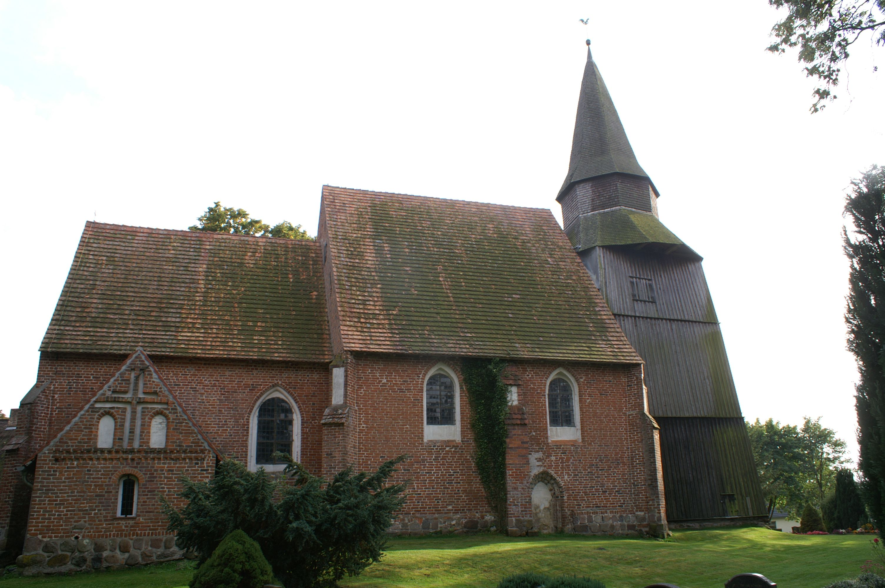 St.-Marien-Kirche in Neu Boltenhagen - Landkreis Ostvorpommern